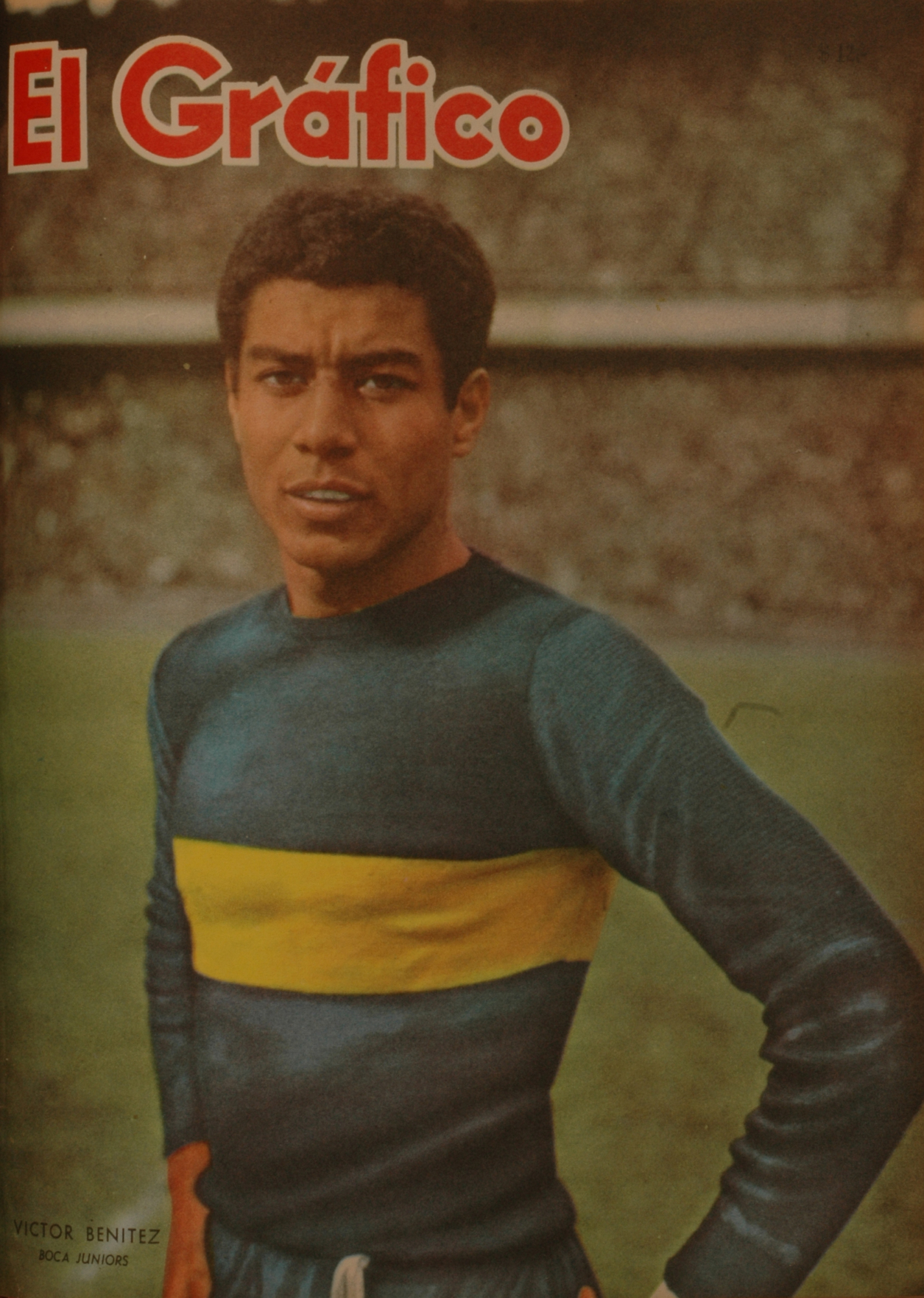 El Grafico del 27 de Septiembre de 1961. Edicion 2191